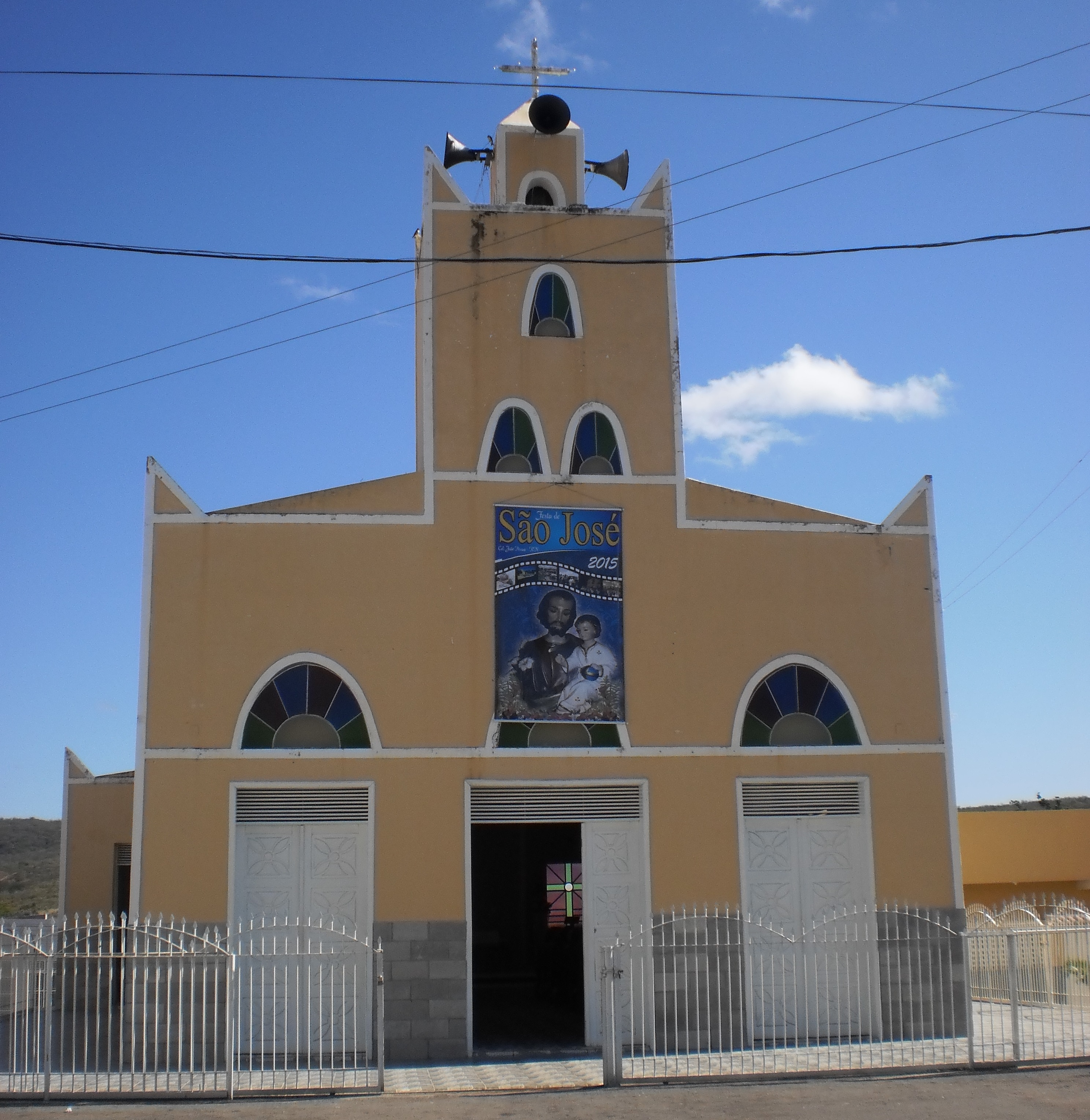 Capela São José, pertencente à Paróquia de São Miguel Arcanjo (São Miguel, RN) em Coronel João Pessoa, Rio Grande do Norte, Brasil.